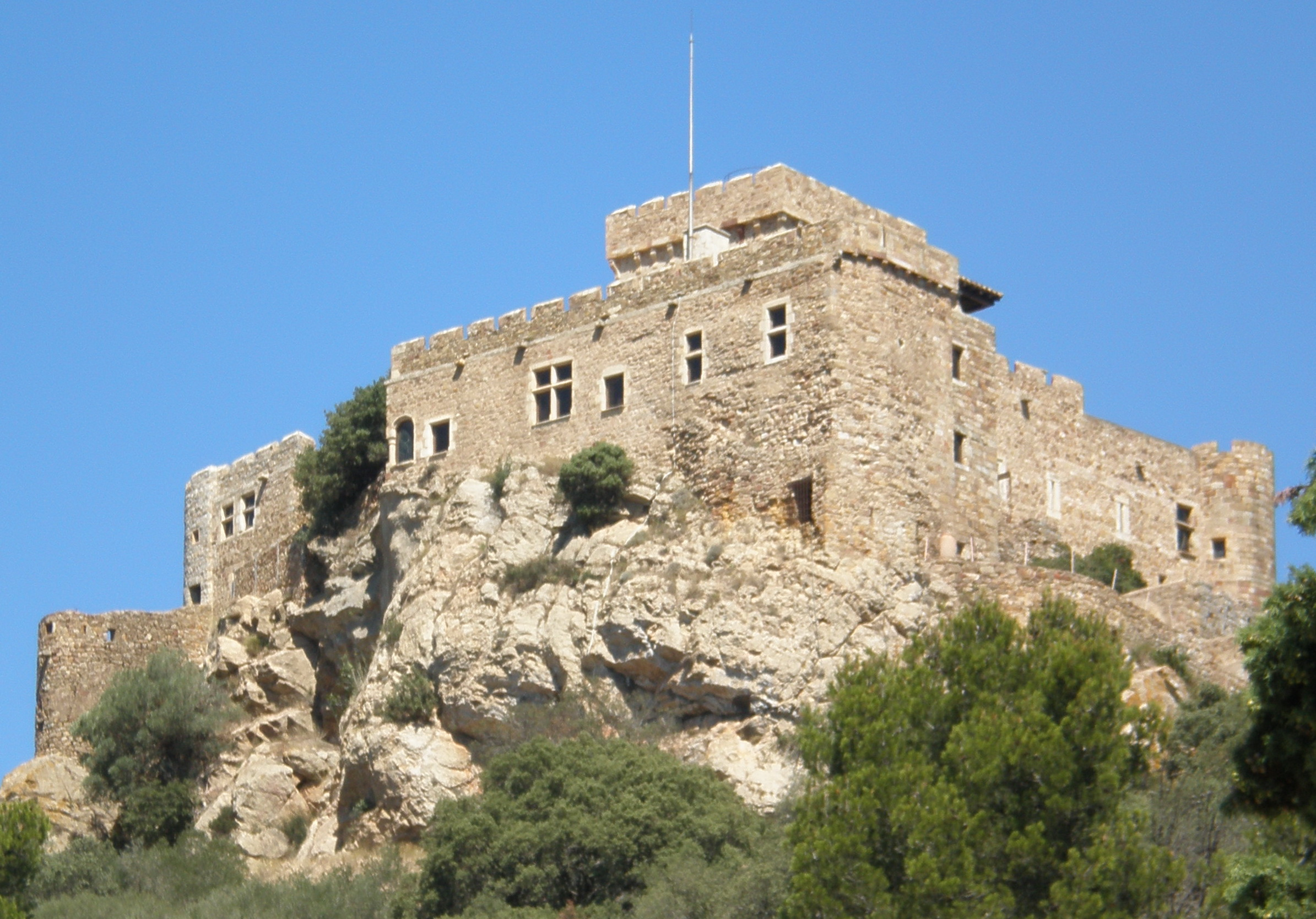 Château de Saint-Martin de Toques à Bizanet